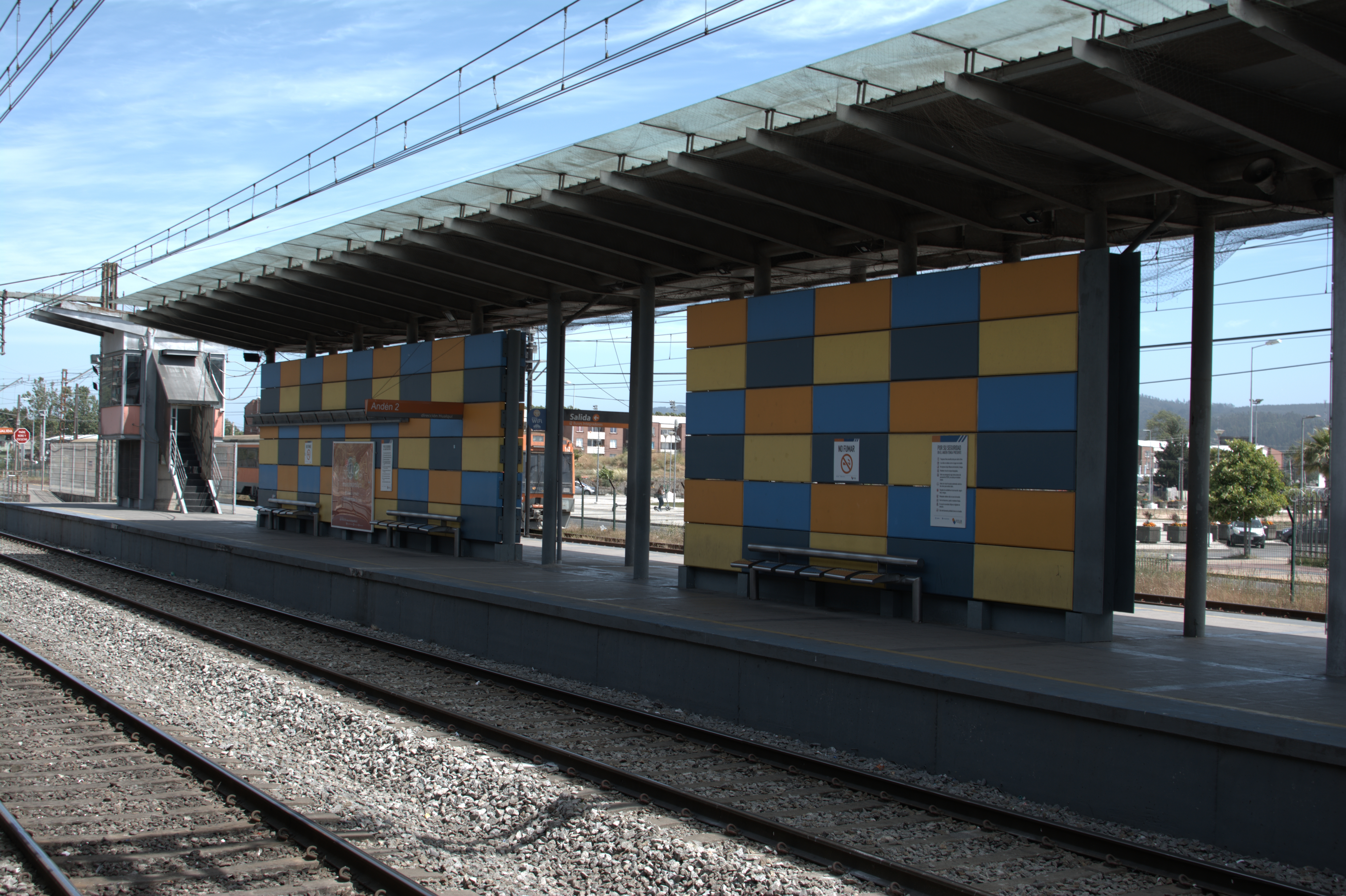 Estación Concepción, detalle de andén. Concepción, diciembre de 2019